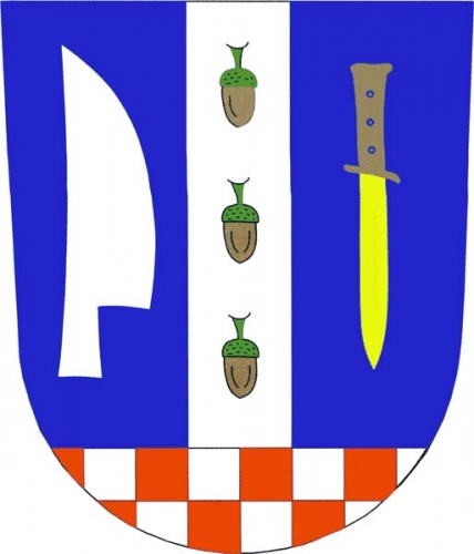 znak, Hrabětice, okres Znojmo